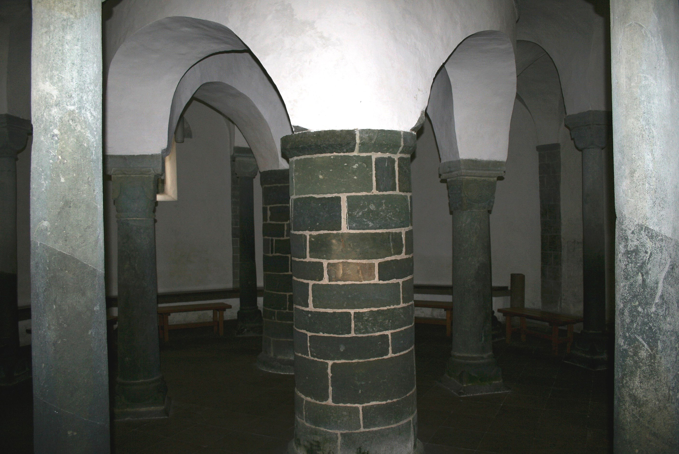 Innerer Kranz mit zwei dickeren und zwei dünneren sich gegenüberliegenden Säulen in der unter Denkmalschutz stehenden „Drüggelter Kapelle“ im Ortsteil Delecke der Gemeinde Möhnesee.